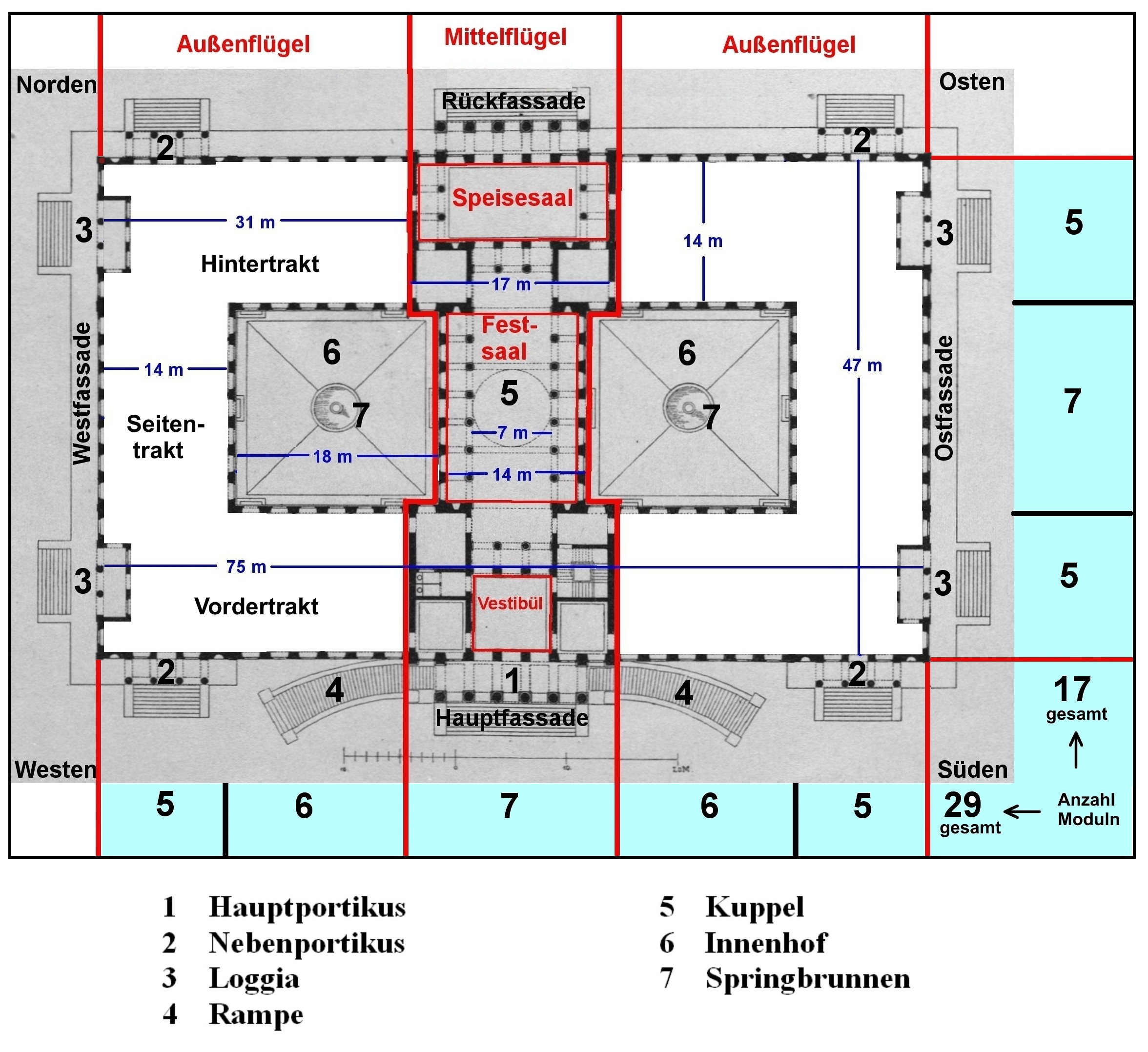 Grundriss des Erdgeschosses von Schloss Rosenstein in Stuttgart mit Bauteilplan und BemaßungBenennung der Fassaden.